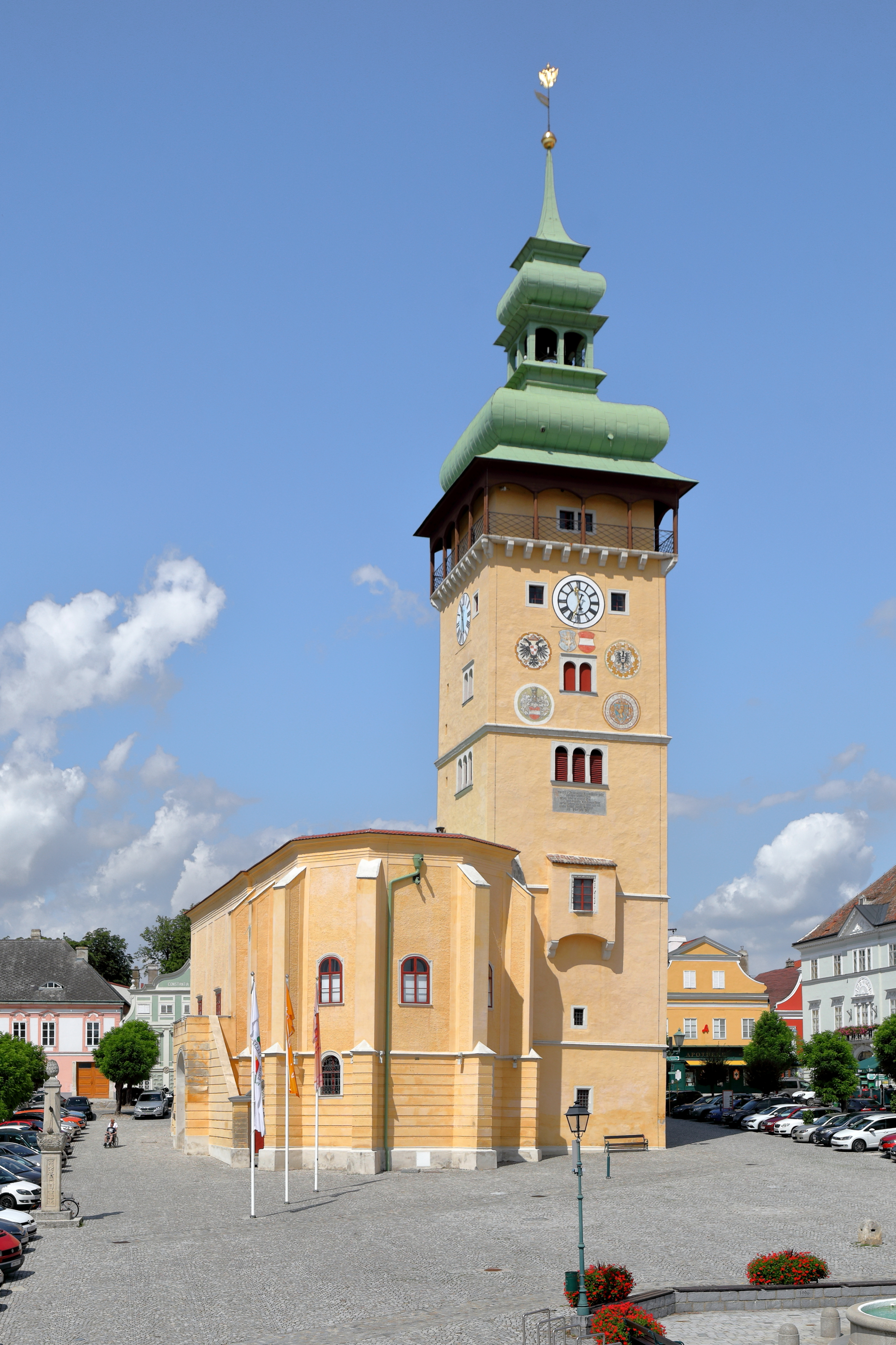 Das ehemalige Rathaus mit Rathausturm am Hauptplatz in der niederösterreichischen Stadtgemeinde Retz. Ursprünglich als gotische Kirche gebaut, blieb sie unvollendet und wurde Mitte des 16. Jahrhunderts zu einem Rathaus mit Rathausturm umgebaut.